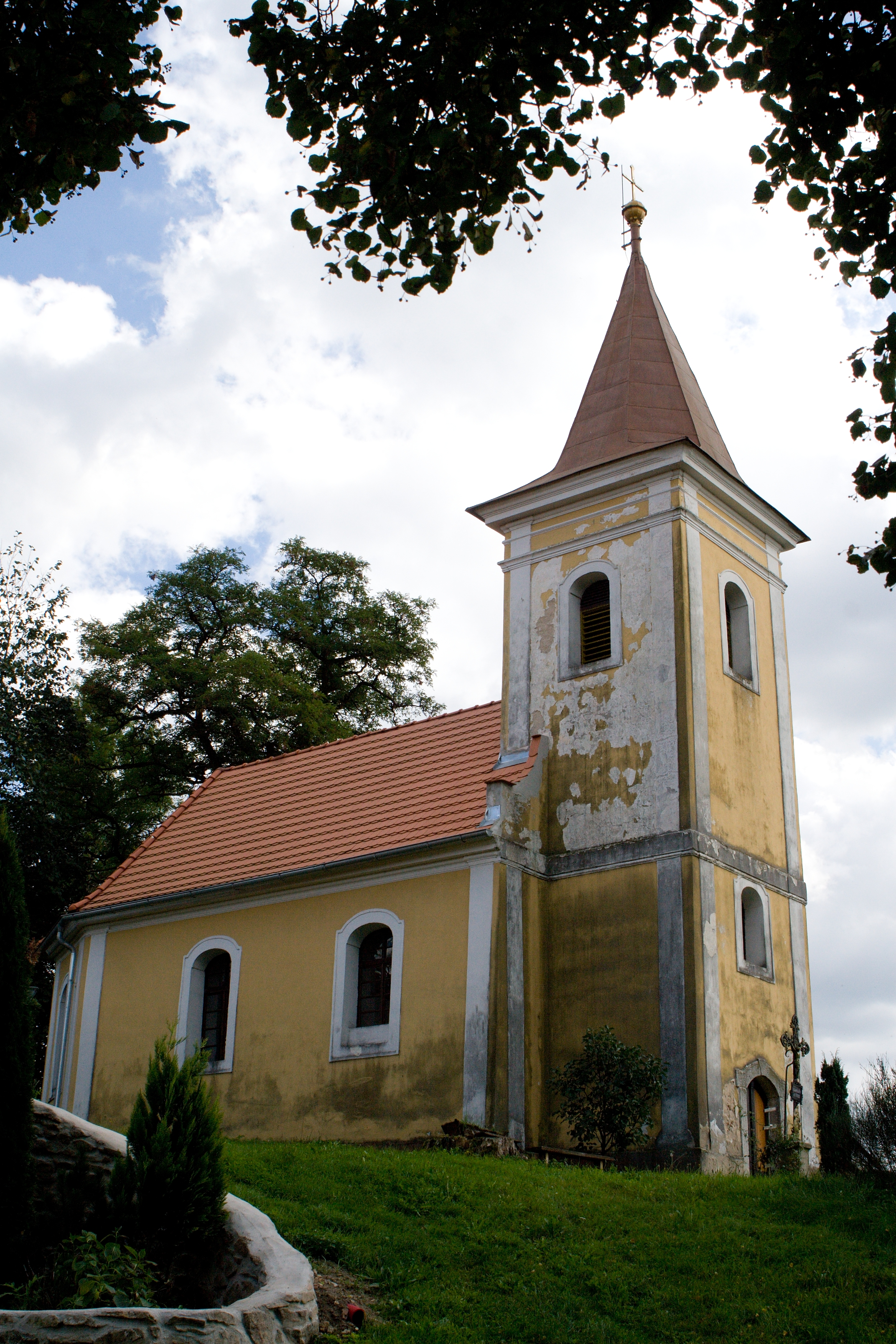 Kaple (Klenov), náves, Klenov